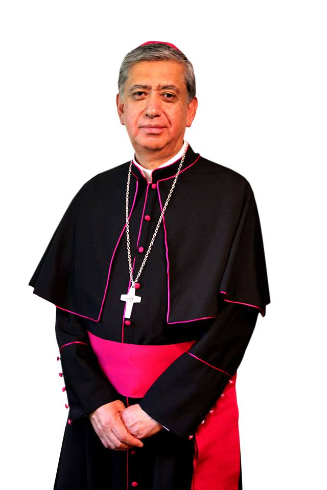 Mons. Julio César Salcedo Aquino, IV Obispo de Tlaxcala